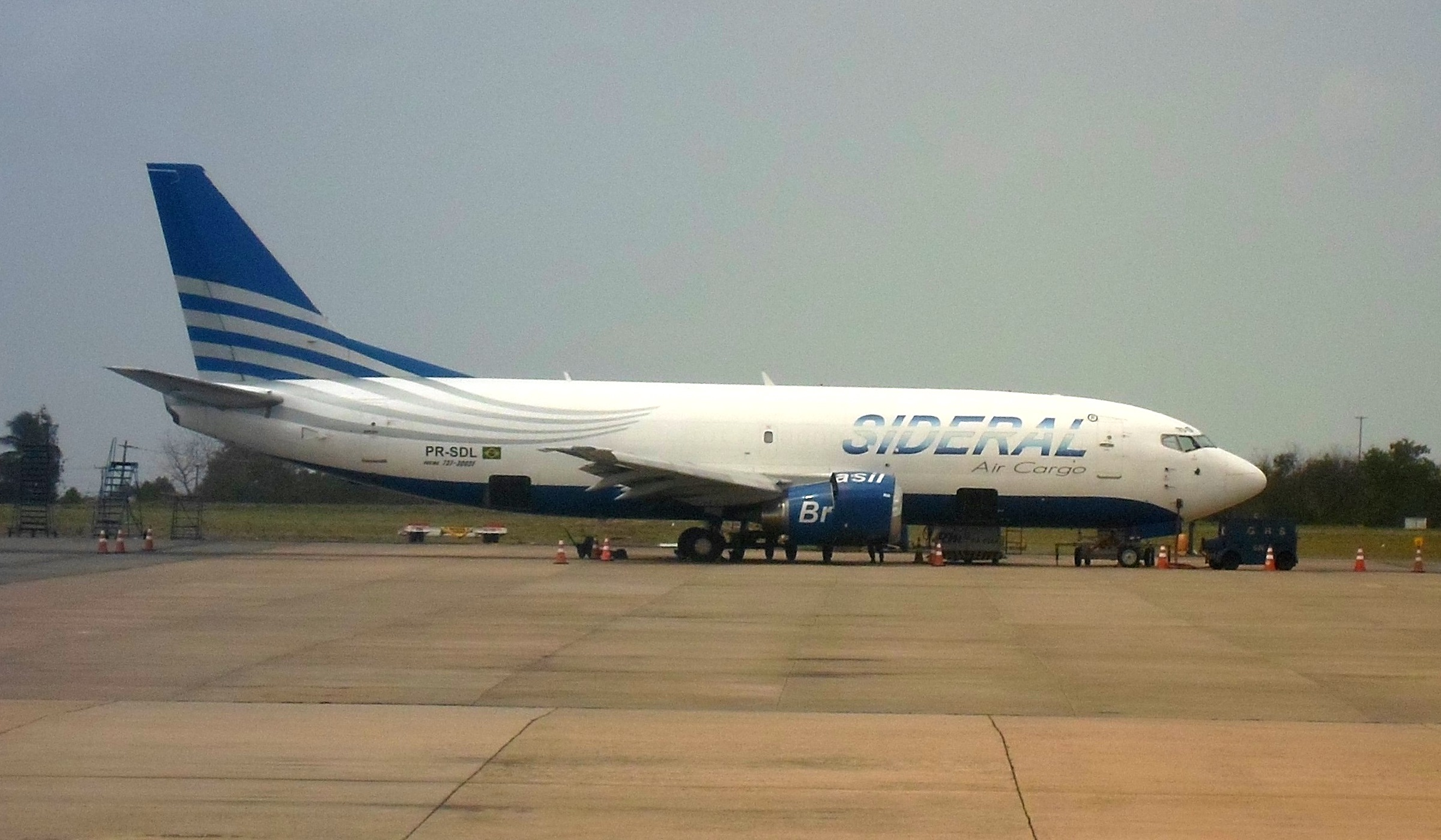 Boeing 737-300 da Sideral Air Cargo, de prefixo PR-SDL, no Aeroporto de São Luís, Maranhão.